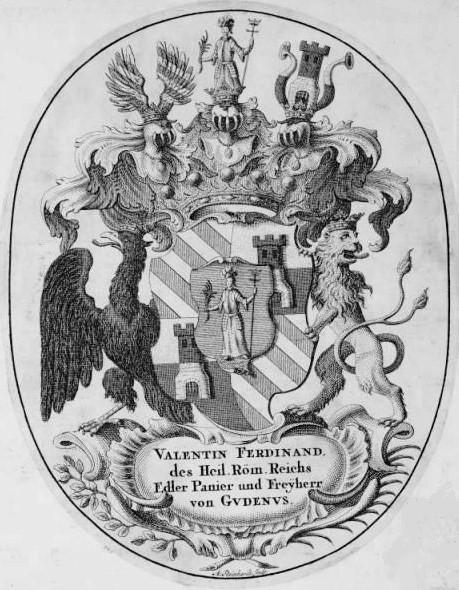 Wappen (Exlibris/Bucheignermarke) des Valentin Ferdinand Freiherr von Gudenus (geb. 19. Juni 1679 - gest. 9. März 1758)